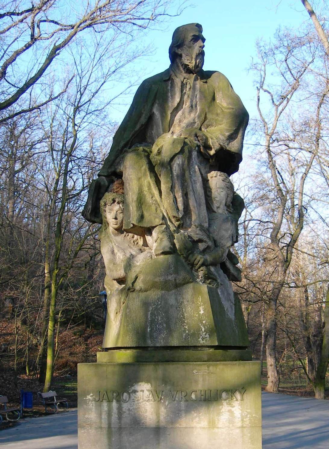 Jsoef Wagner (1901-1957): the poet Jaroslav Vrchlicky. Praha, Petřín.